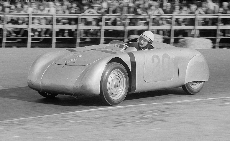 Original image description from the Deutsche FotothekAutomobilrennfahrer in seinem Wagen mit der Nummer 30 beim 6. Leipziger Stadtparkrennen